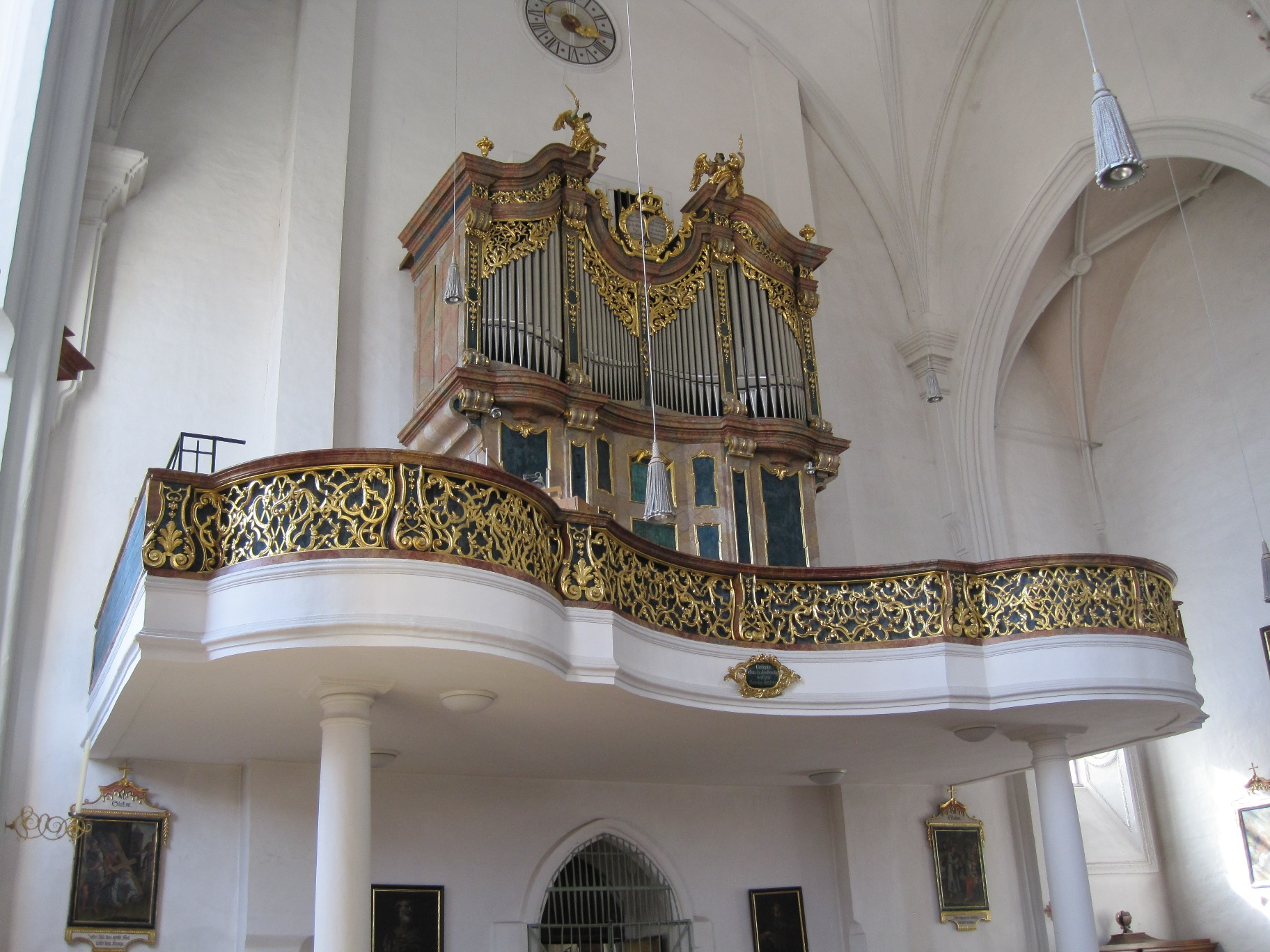 Orgel von St. Laurentius in Tittmoning